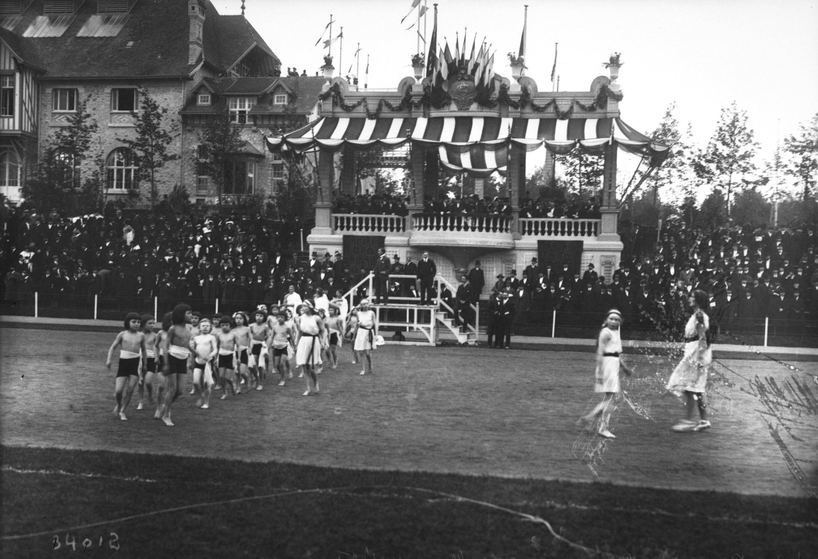 athlètes faisant des exercices devant la tribune présidentielle au parc Pommery le 19-10-1913 devant M. Poincaré